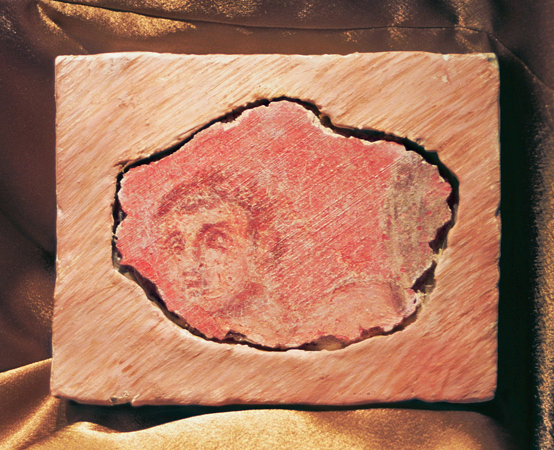 Villa Rustica Szentendre-Skanzen, Ungarn: Freskenrest aus der Villa. Aufgenommen während der Sonderausstellung „Visegrád évszázadai – A római kor kezdete a Dunakanyarban“ die vom 19.08.2011 bis 20.07.2012 im Mátyás Király Múzeum (König-Matthias-Museum), Visegrád, stattfand.